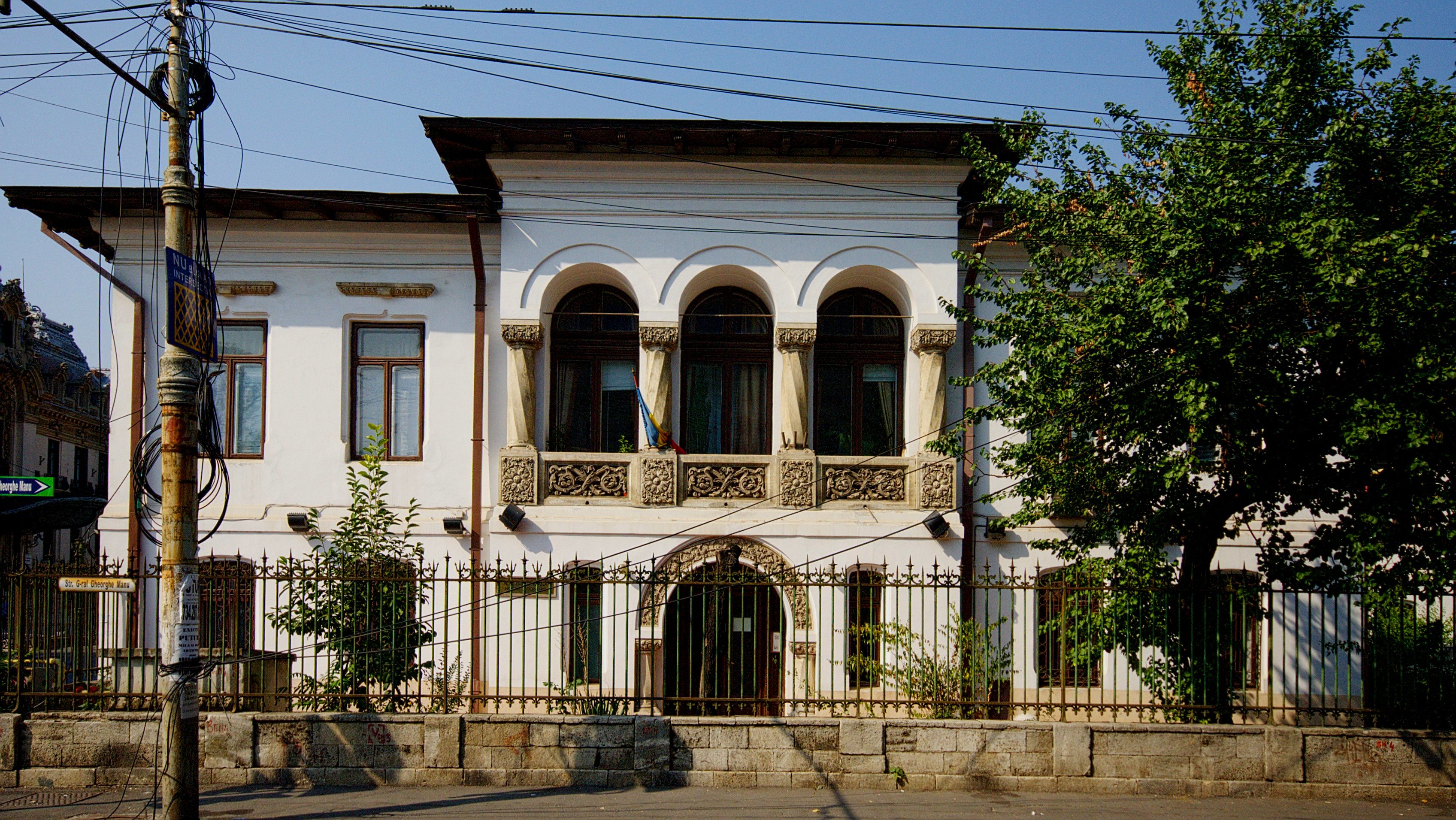 Casa Dissescu - str. Gheorghe Manu, Calea Victoriei 196